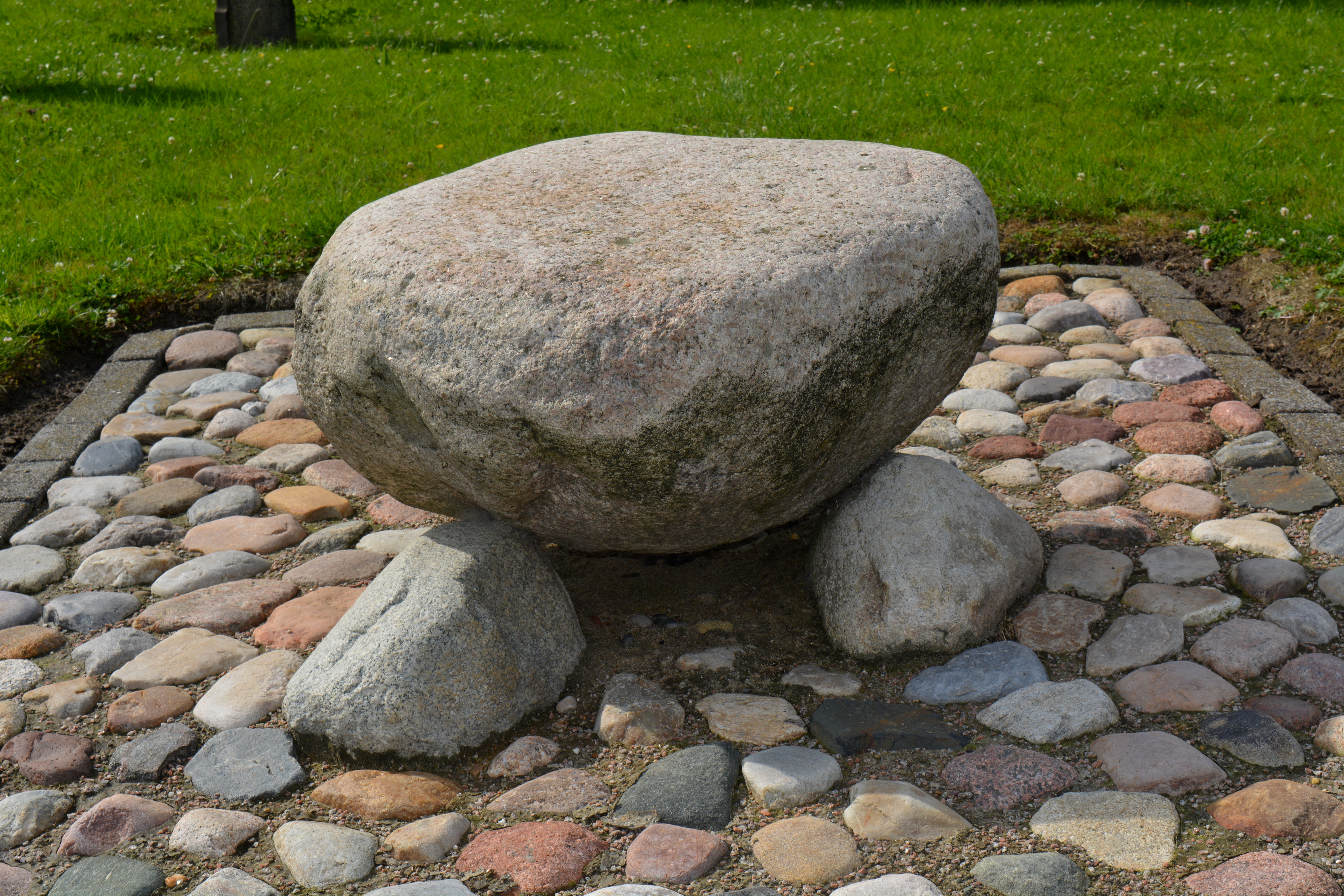 Burum, prot. Terpkerk